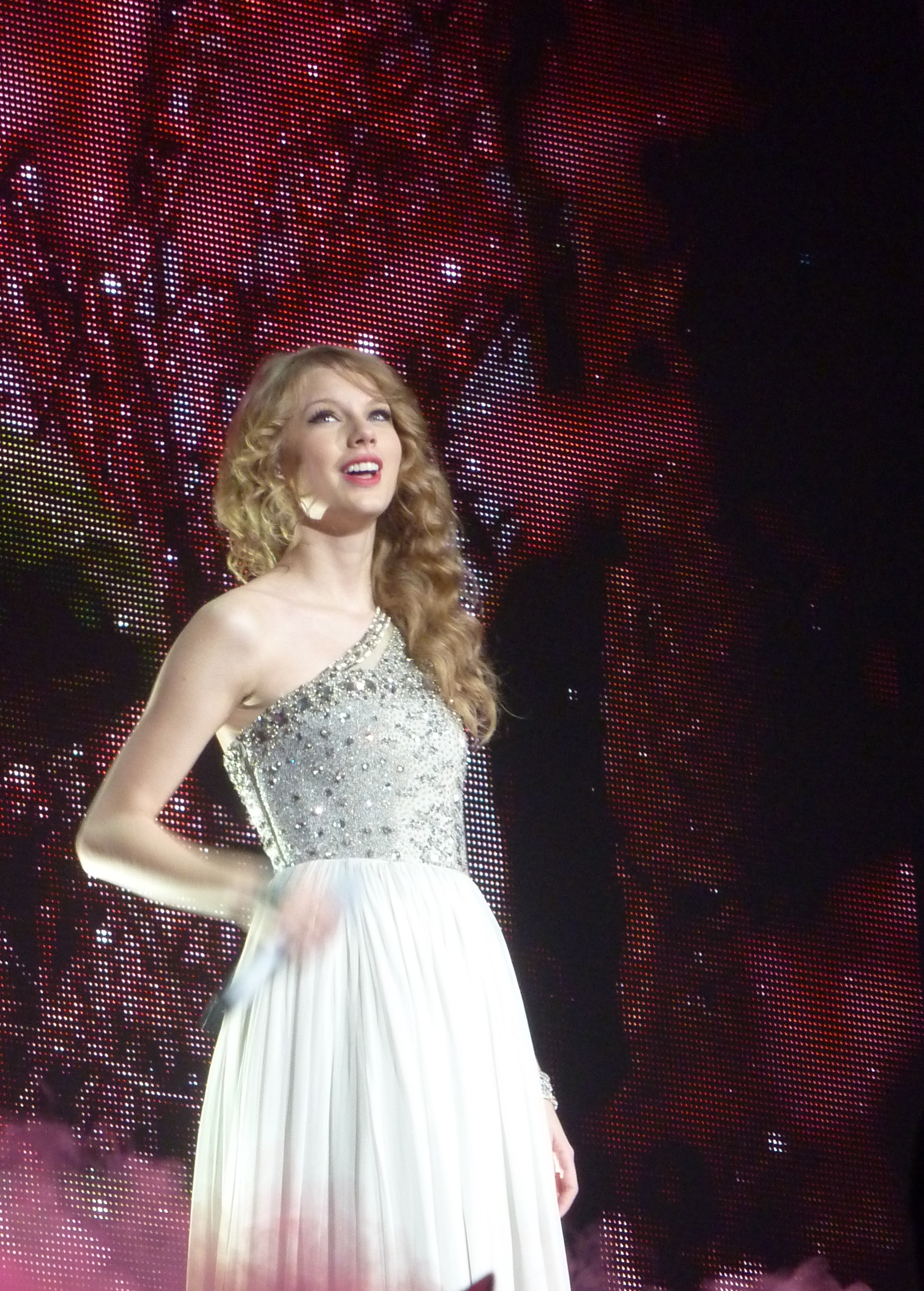 Taylor Swift en concert à Paris en Mars 2011